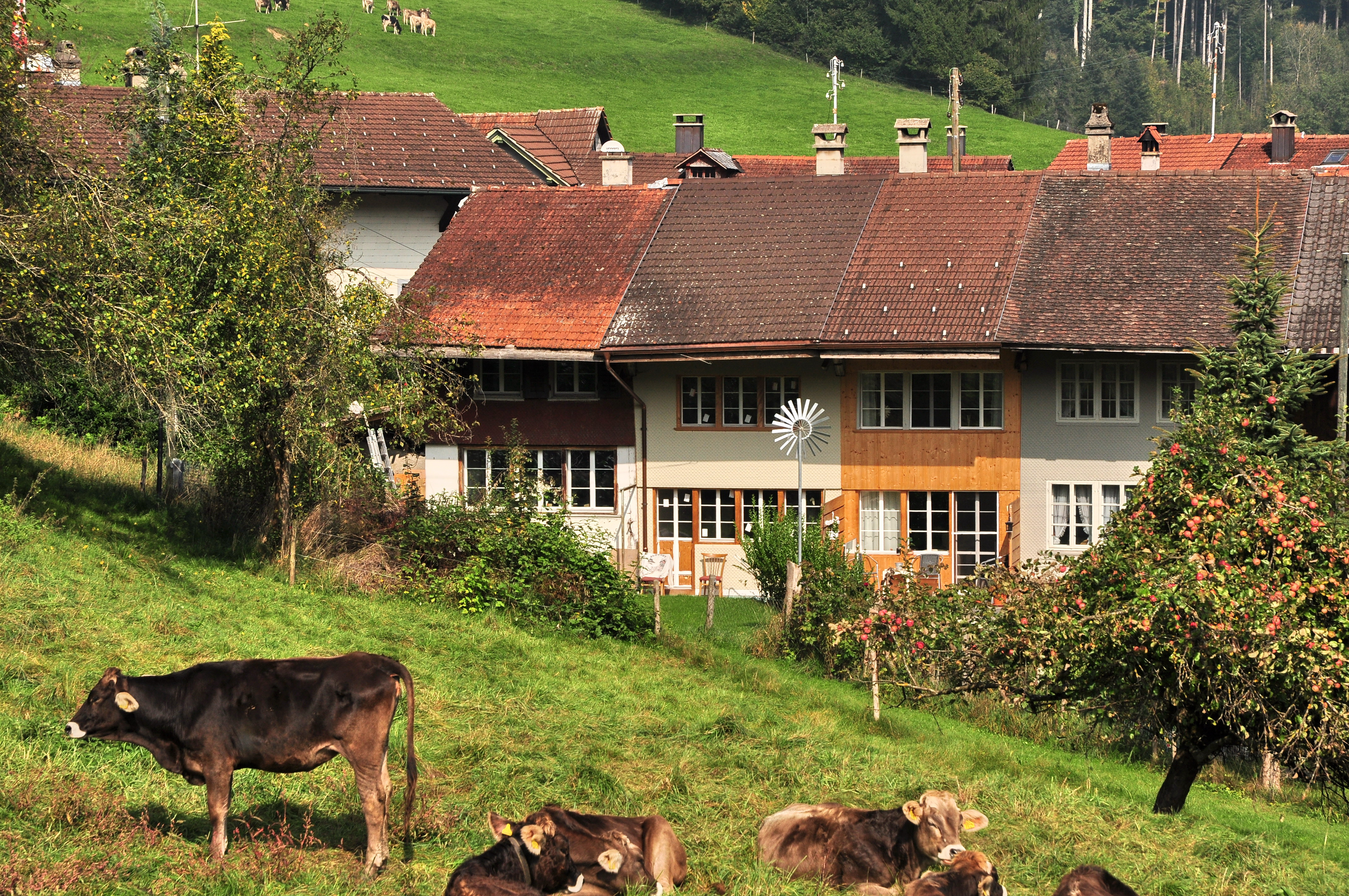 Flarz mit Haus Freddi, Undelstrasse 29–37 in Bauma (Switzerland)